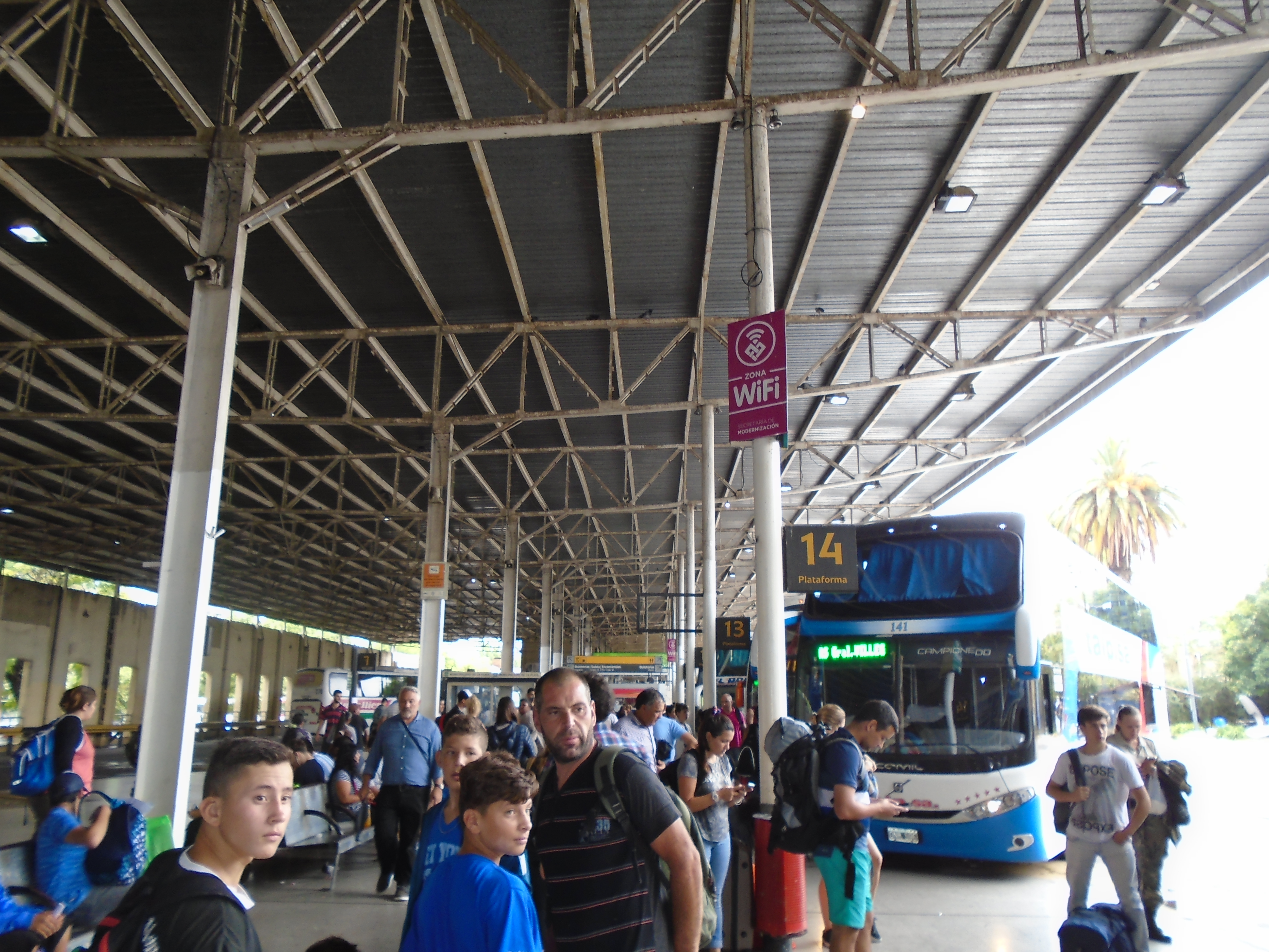 La Plata